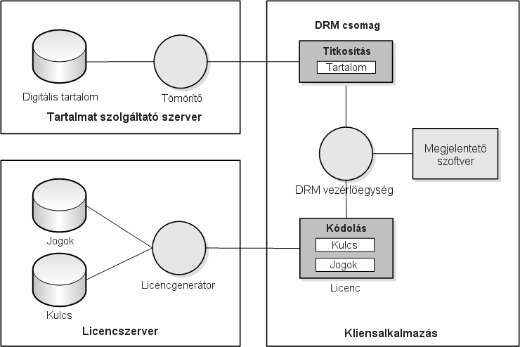 Digital Rights Management - Digitális jogok kezelési rendszereinek klasszikus működési elve